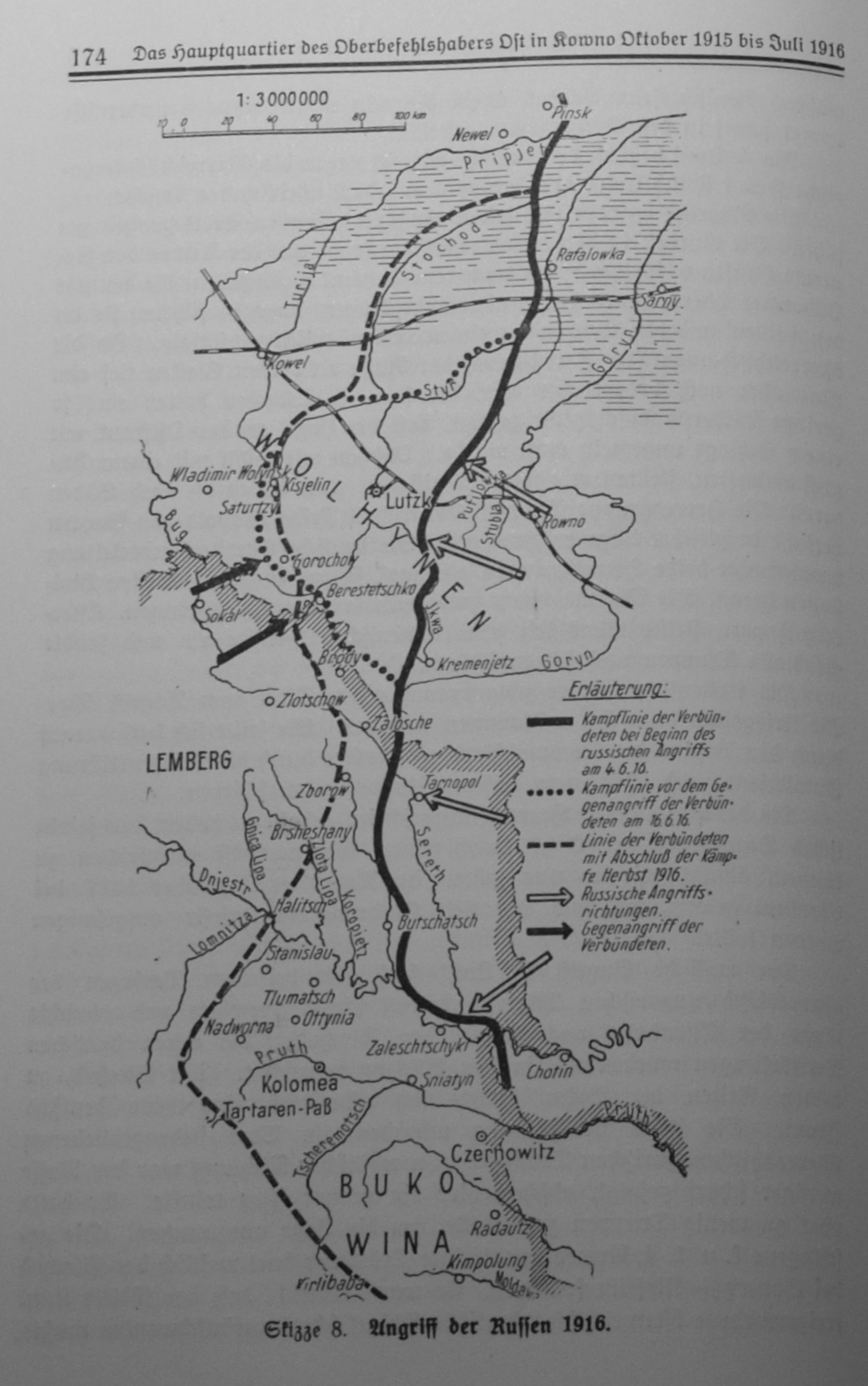 Foto "Meine Kriegserinnerungen" 1914 - 1918